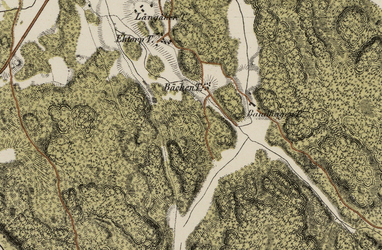 Del av karta "Trakten omkring Stockholm 1861"med Bandhagen och omgiving